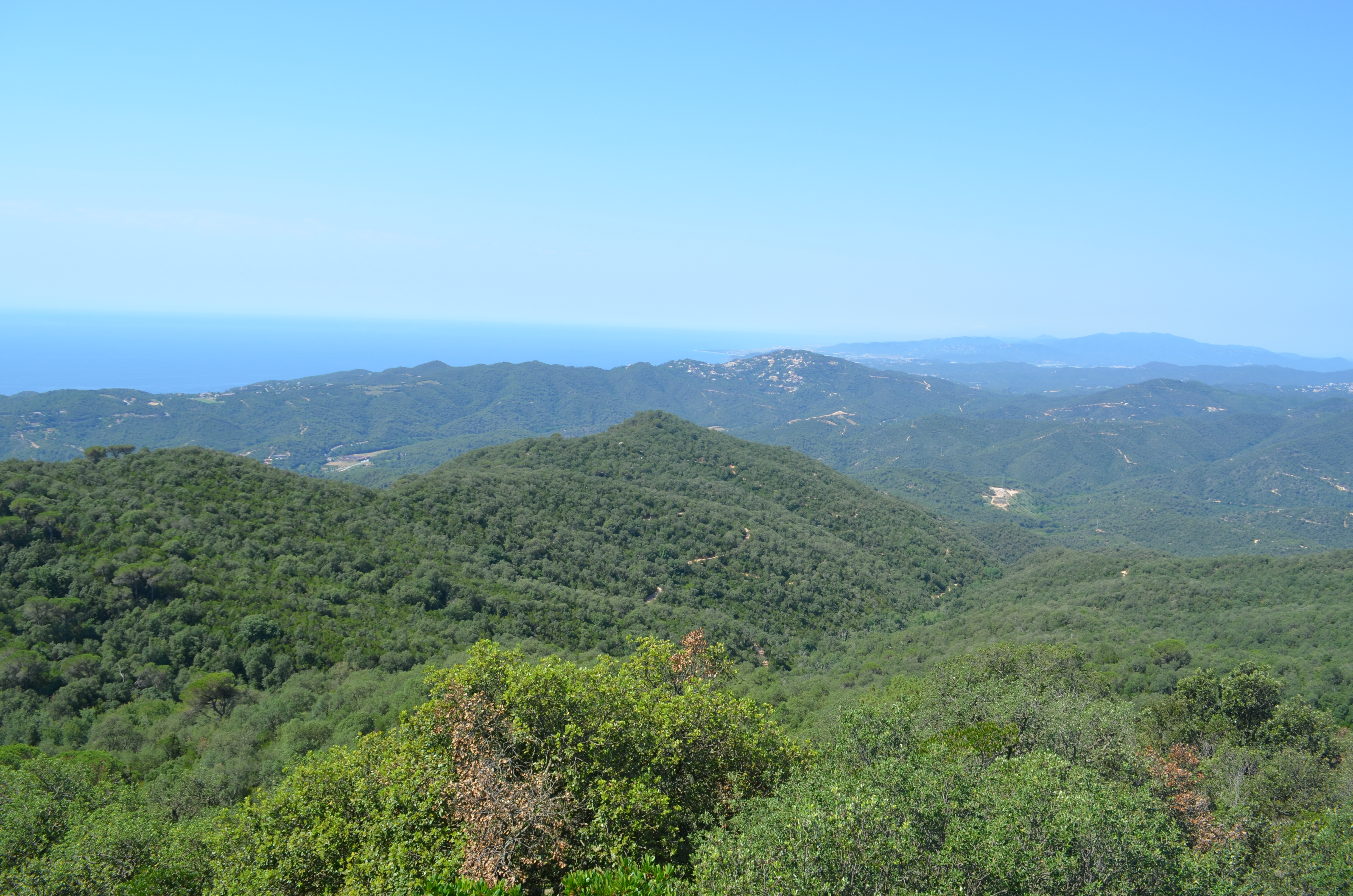 Montllor Petit